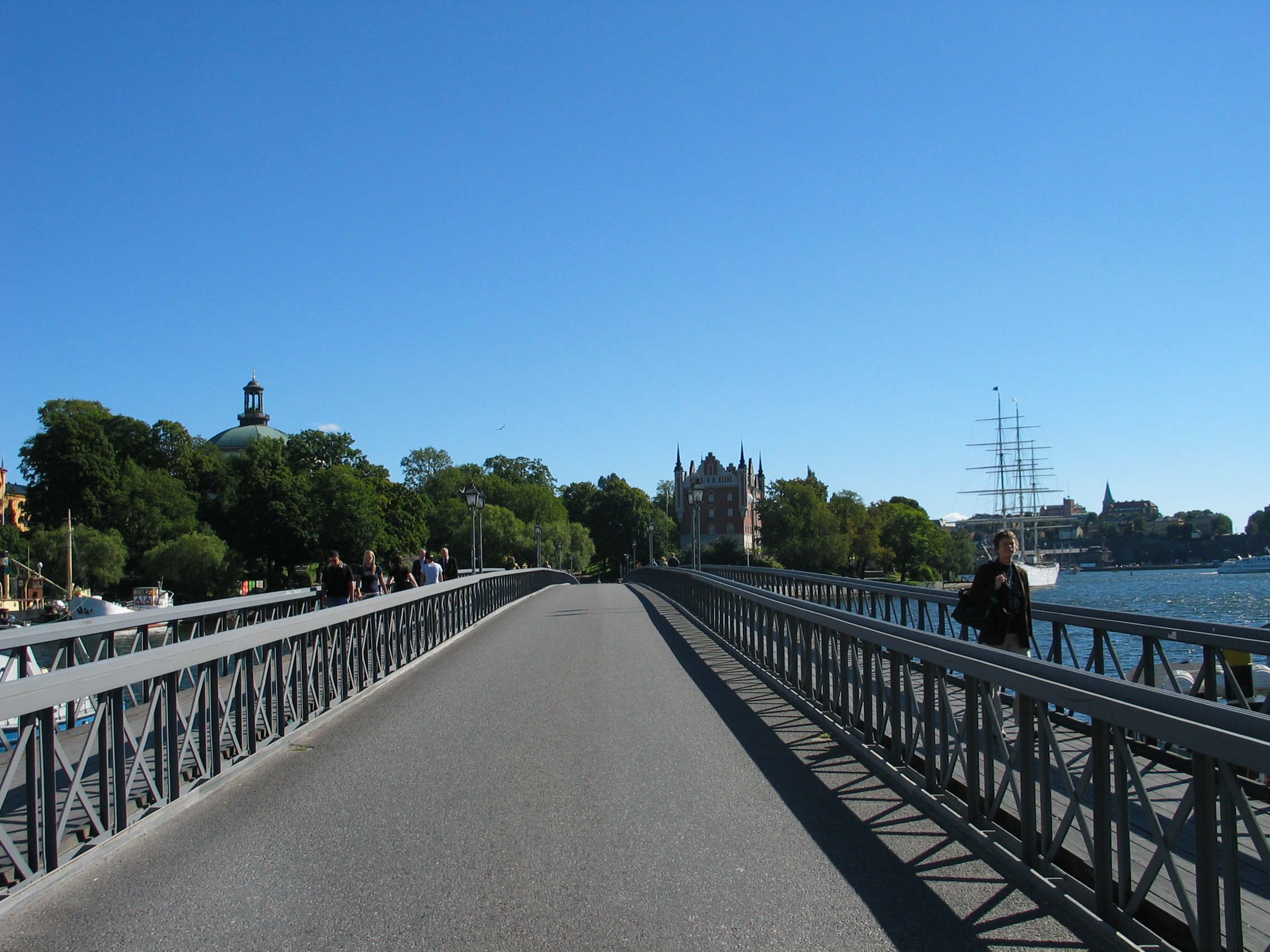 Skeppsholmsbron, a bridge in Stockholm, Sweden.